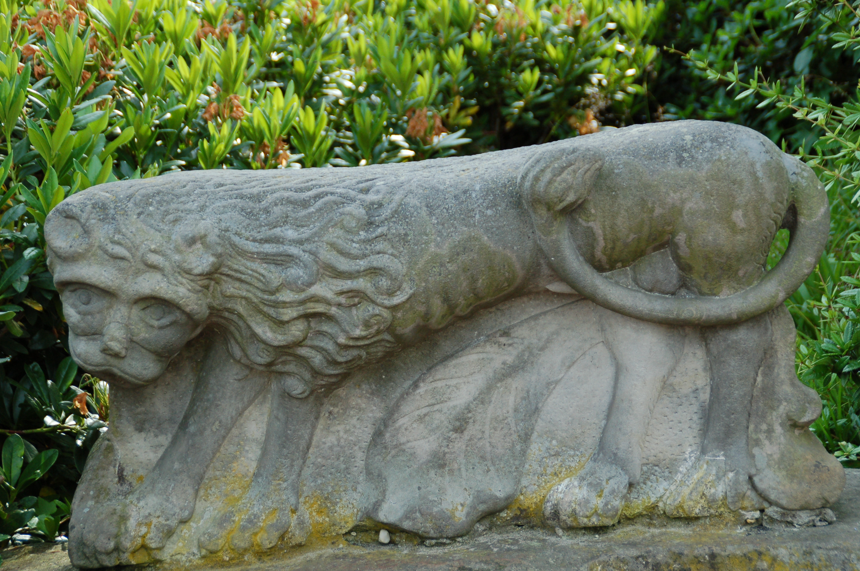 Nordhorn, Bentheimer Sandsteinlöwe